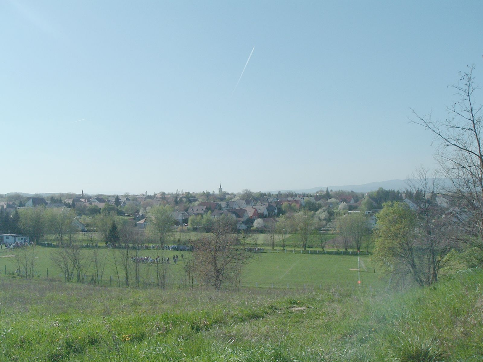 Torony, Hungary